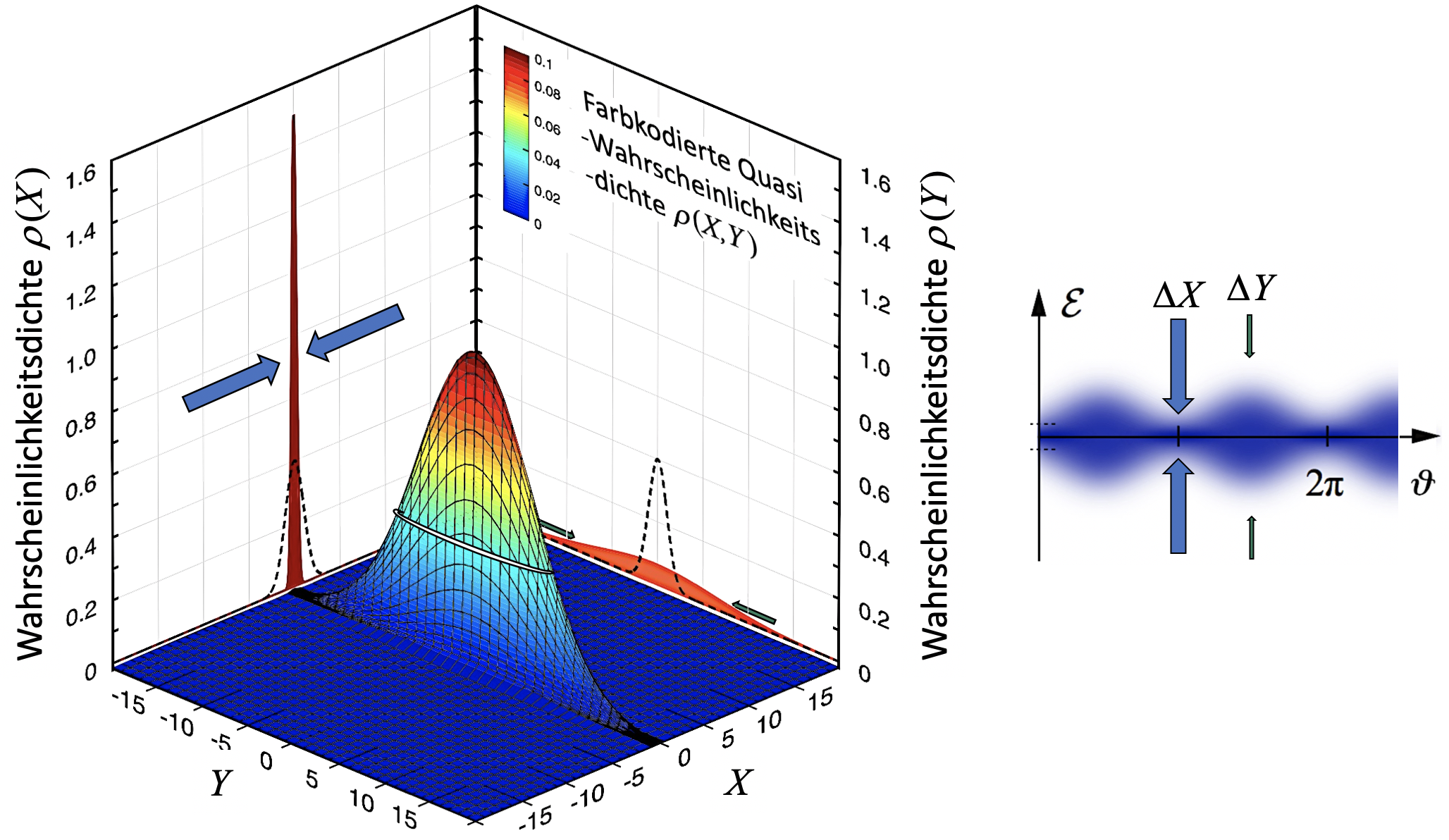 Wigner-Funktion eines gequetschten Vakuumzustandes